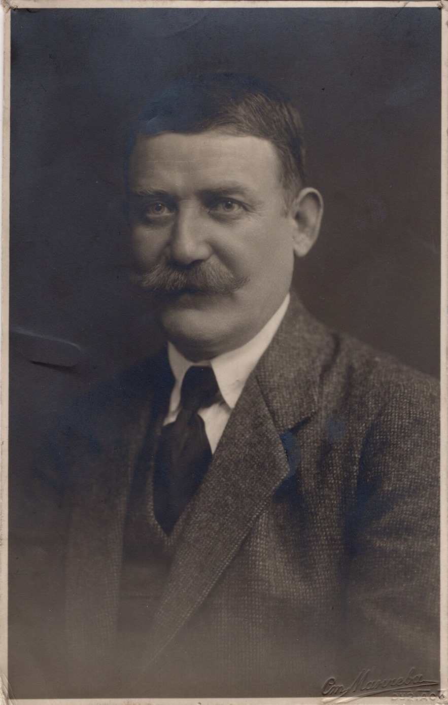 Илия Димушев.